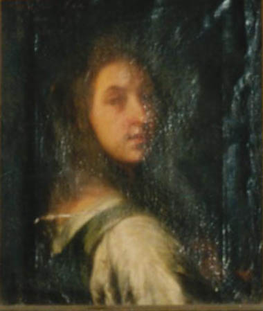 Ritratto di Camilla Faа - Galleria del Castello di Bruno - La bella “Ardizzina”